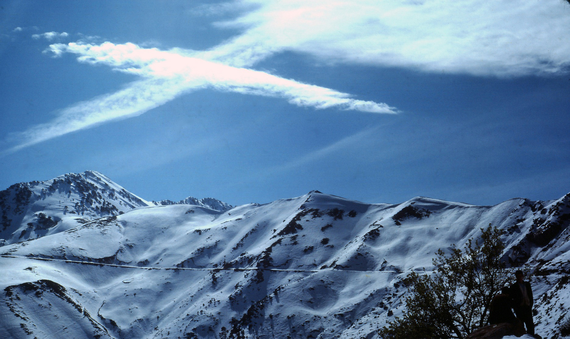 Vue sur les sommets du Djurjura enneigés au printemps (Algérie).